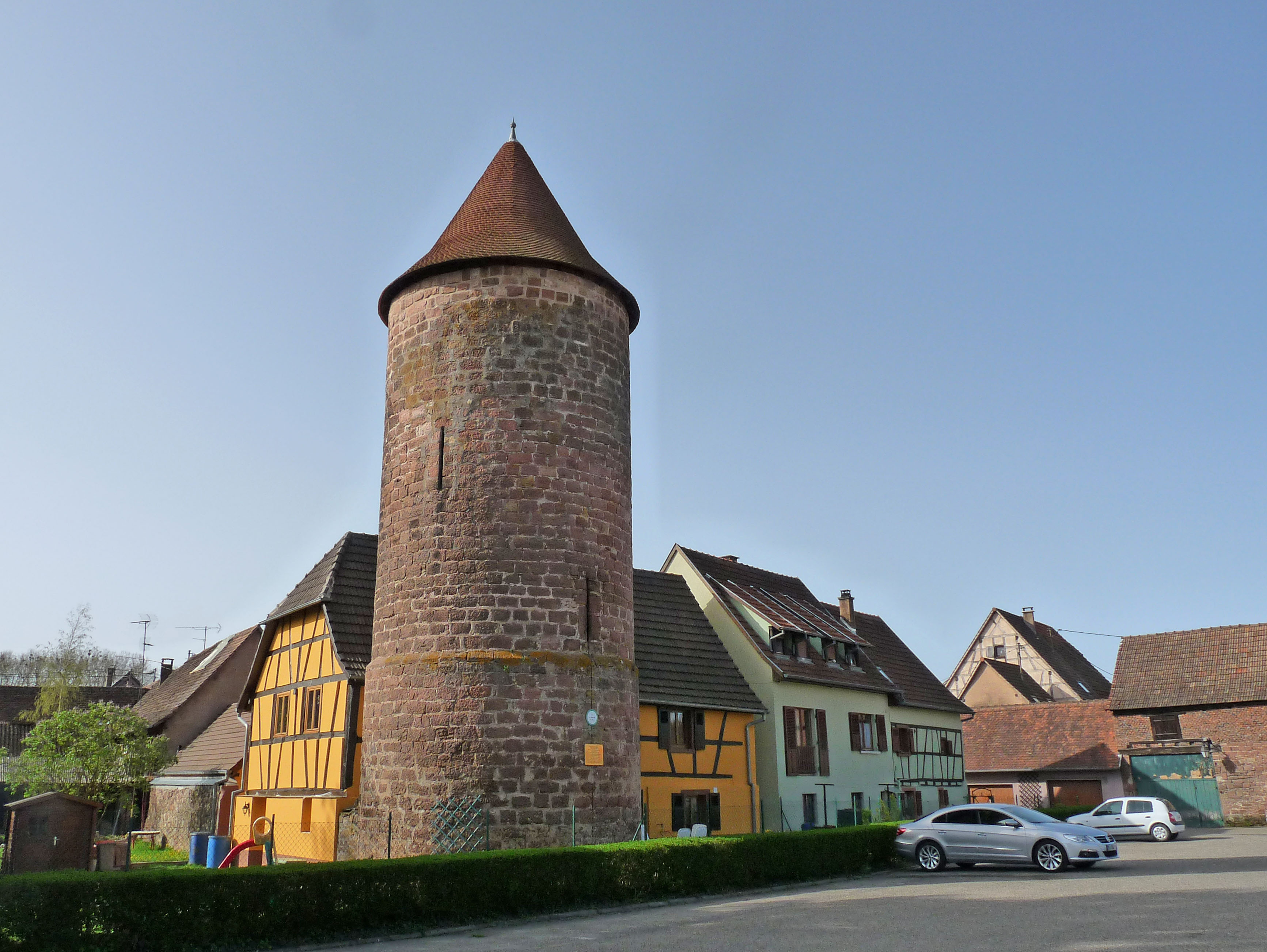 Tour des Suédois à Reichshoffen (Bas-Rhin). Altitude : 178 m. Construction au XIVe-XVe s. Restauration en 2007.